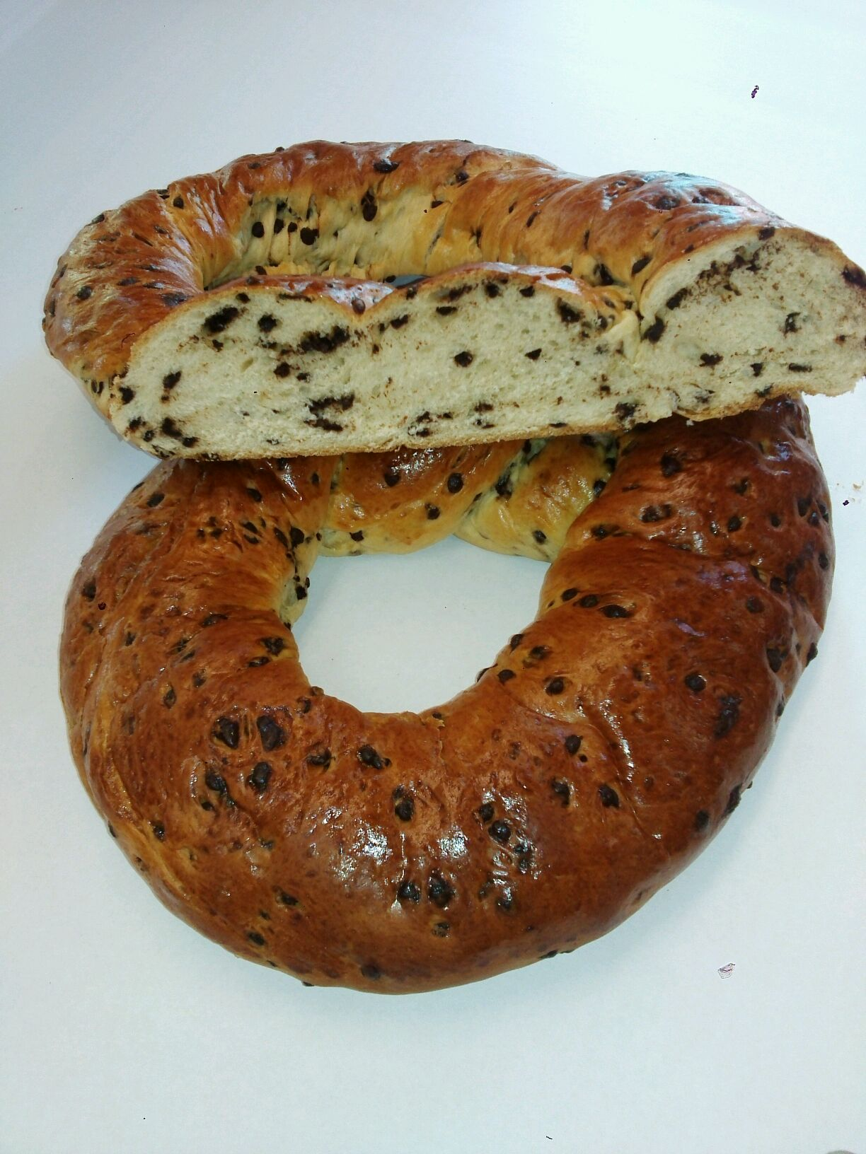 ca. 1000g Schulbrezel mit Schokostückchen im Teig, aufgeschnitten zur Innenansicht, hergestellt zum Schulanfang 2016 in Frankfurt-Harheim von Bäckerei/Konditorei Seipler